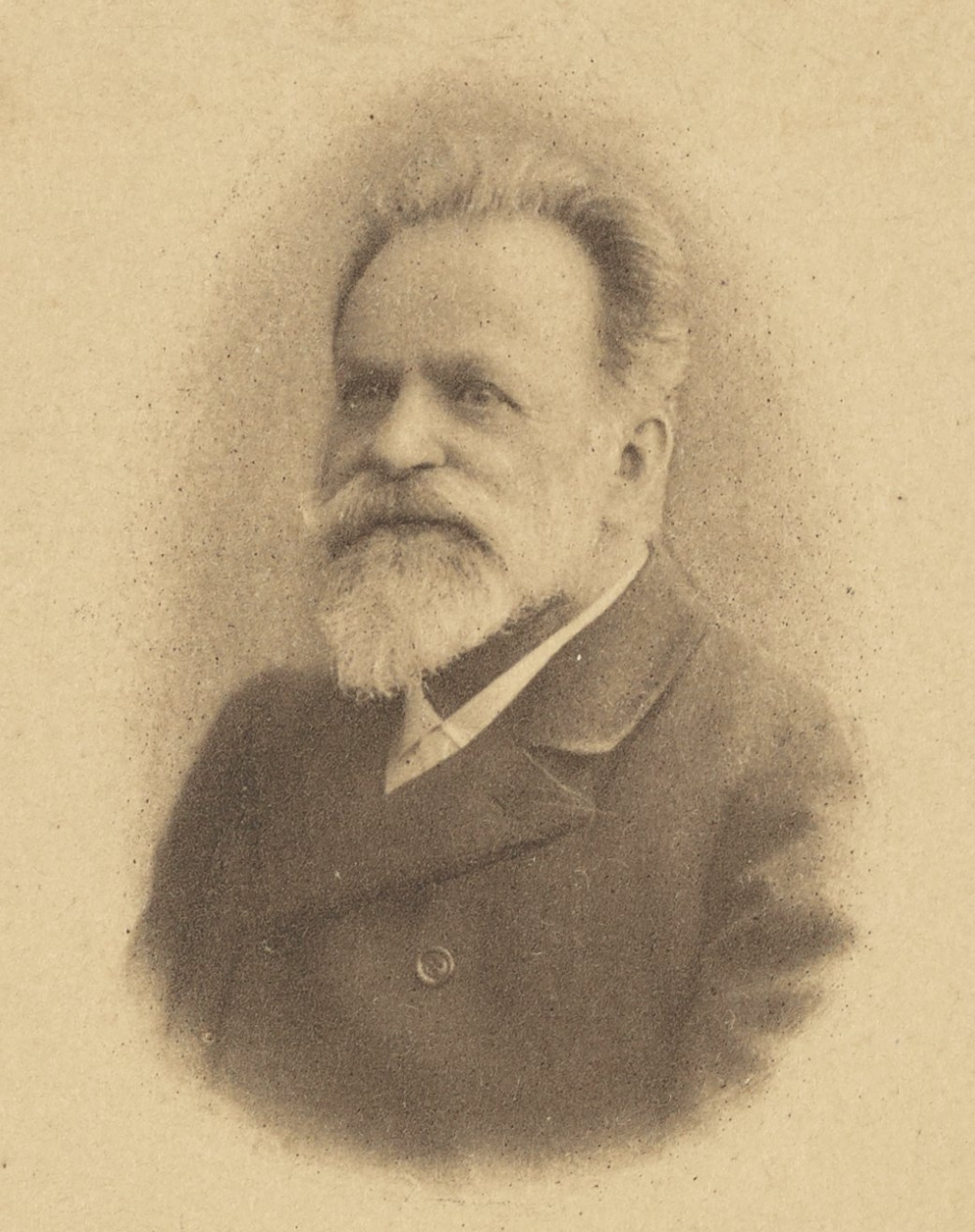 Porträt Paul Sorauer